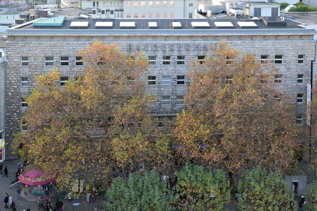 Haus der ehem. Buchhandlung Baedeker im Essener Stadtkern, unter Denkmalschutz